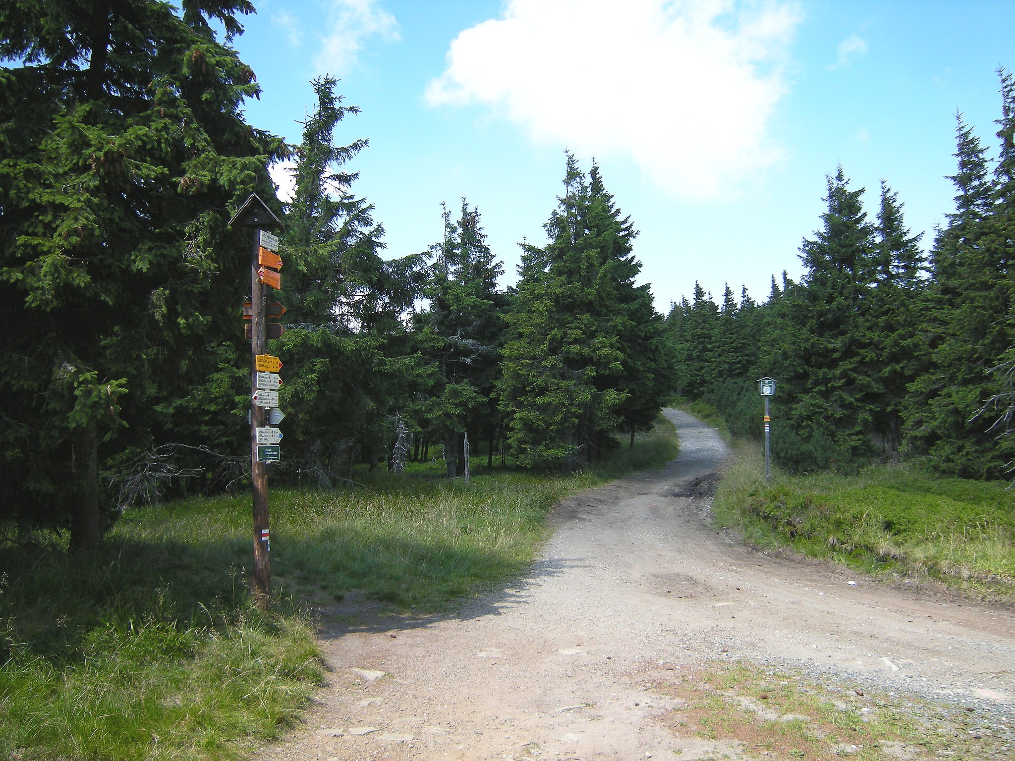 Przełęcz Pod Keprnikiem między szczytami Keprnik i Szerak